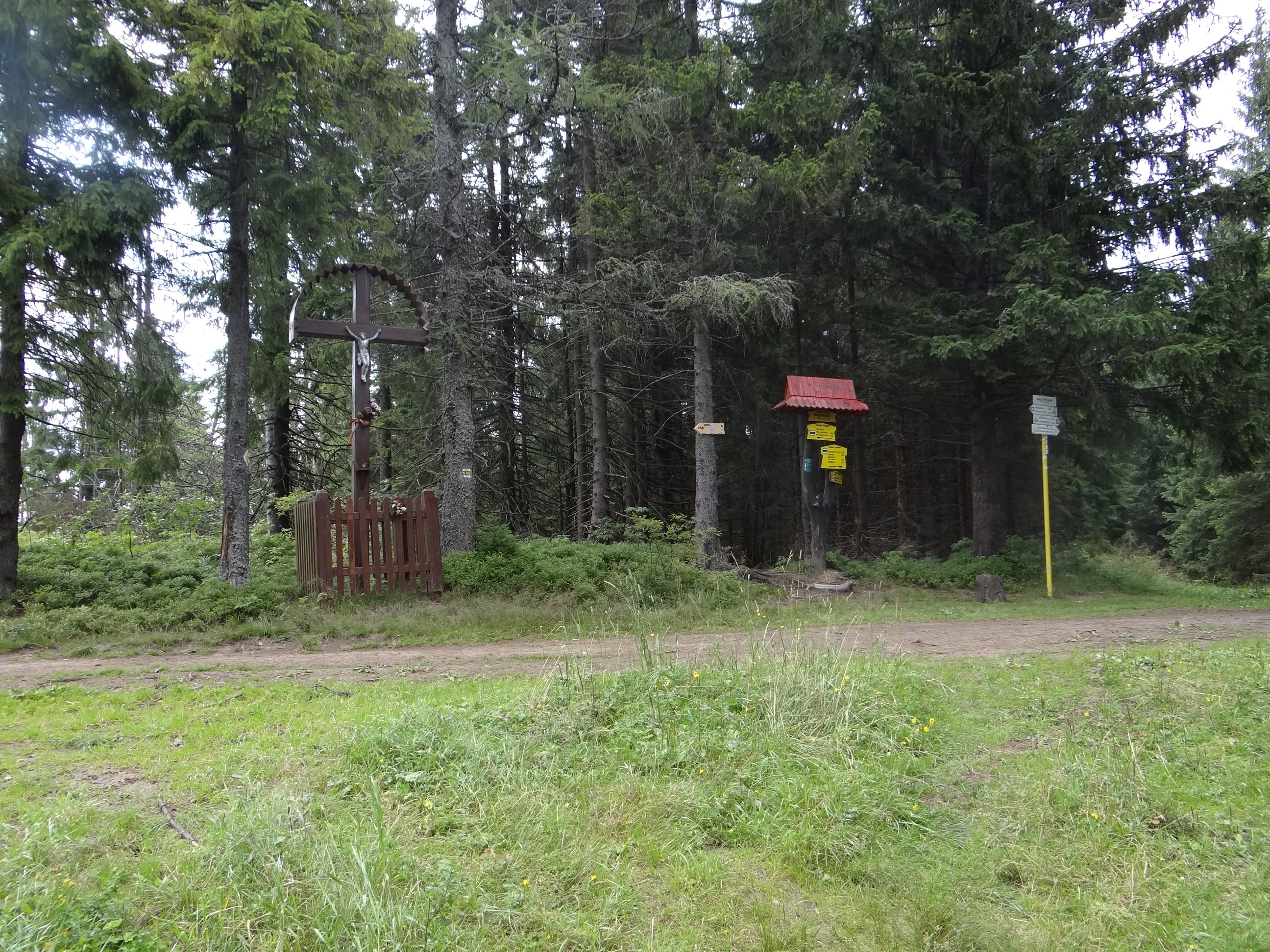 Rázcestie Malá poľana